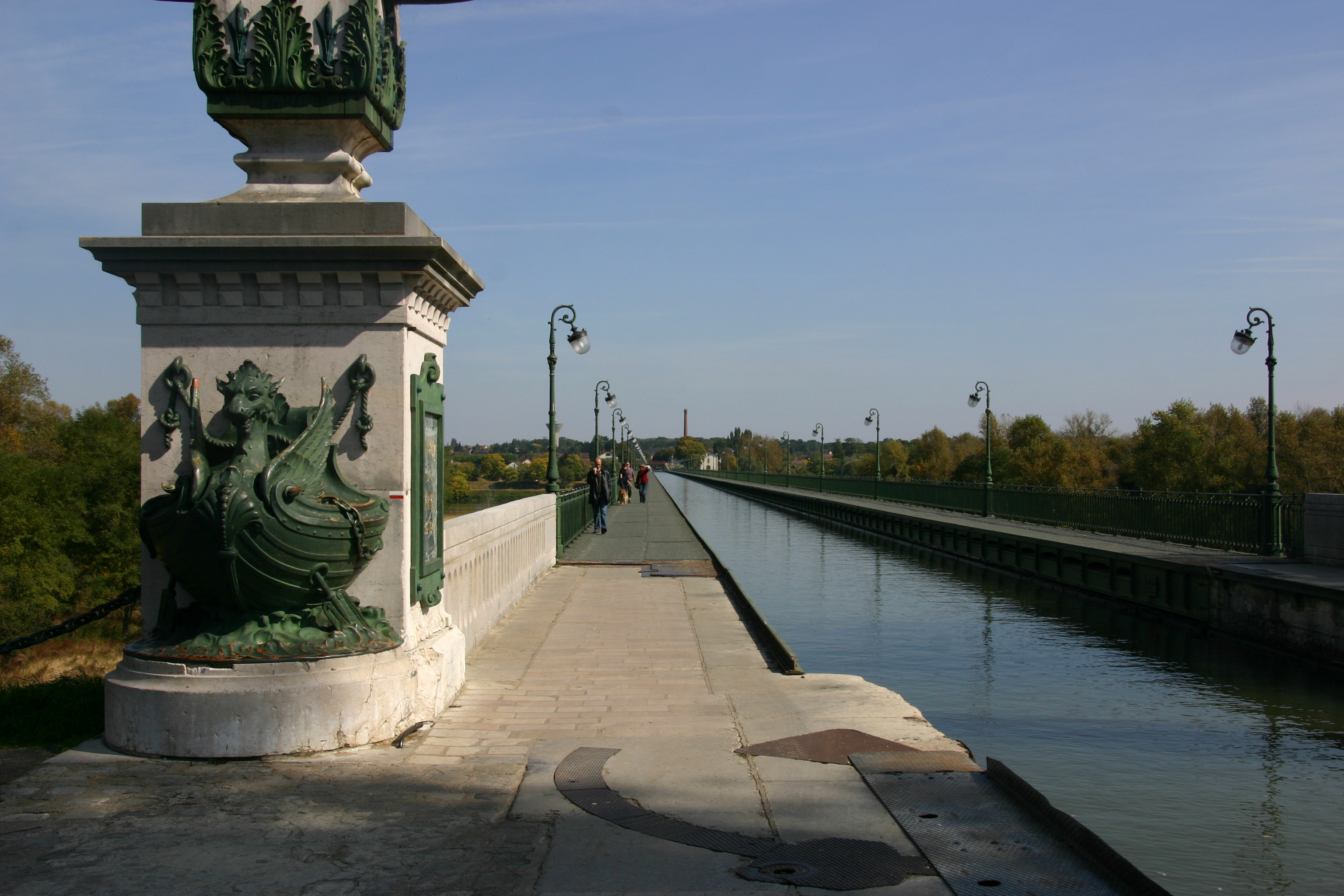 Kanalbrücke Briare; auf ihr quert der Canal latéral à la Loire den tiefer gelegenen Fluss Loire.